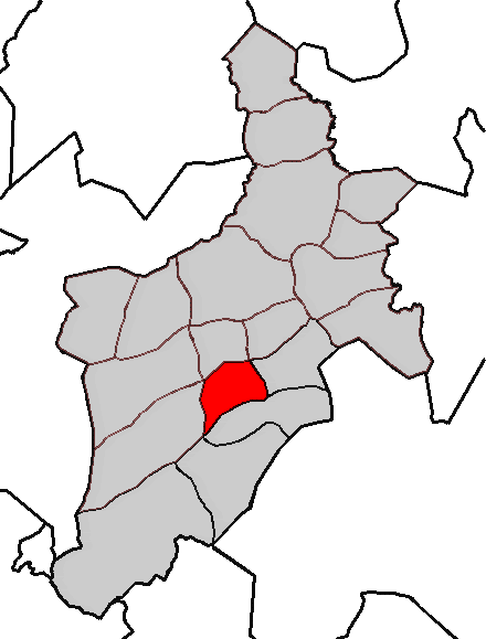 Situación da parroquia de Viós no concello de Abegondo